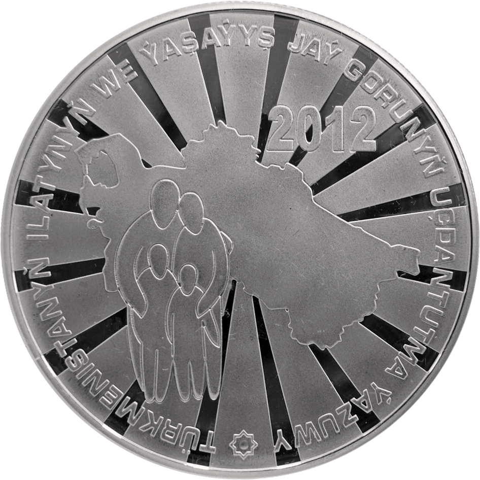 Памятная монета Туркменистана